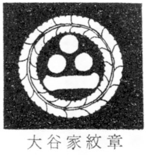 大谷家の紋章